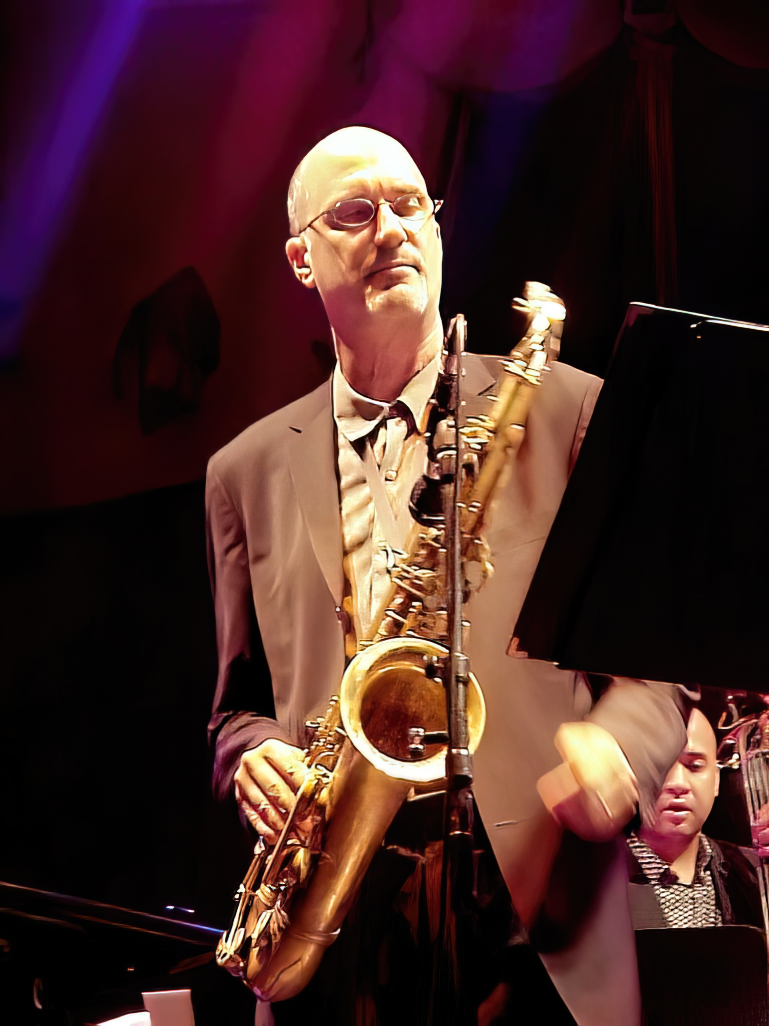 Michael Brecker Munich July 2001